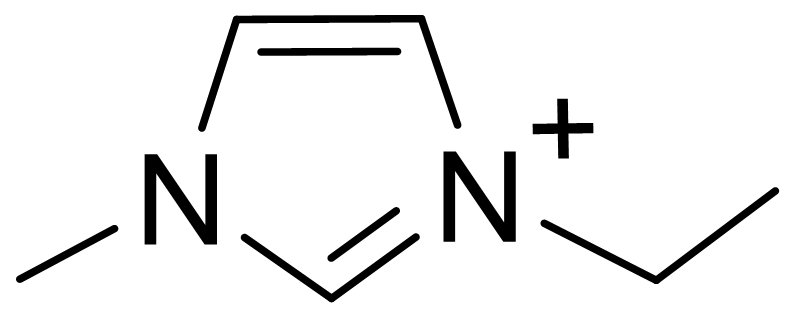 イオン液体